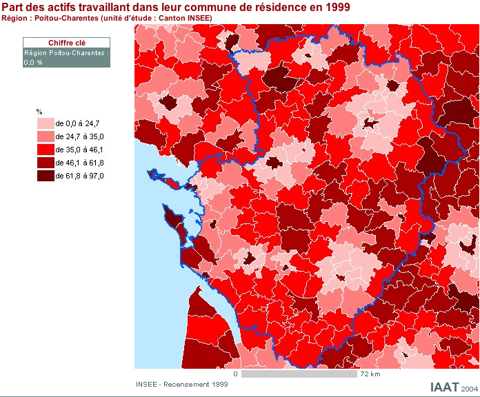 Carte des actifs travaillant dans leur commune de résidence, Poitou-Charentes, 1999 Cette carte est généreusement fournie par l'IAAT (Institut atlantique d'aménagement du territoire) Je la place comme convenu avec eux sous licence GFDL